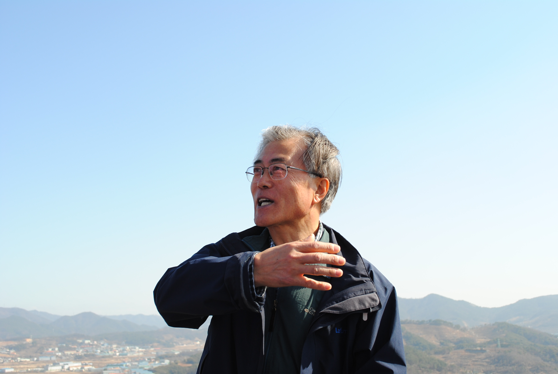 == 라이선스 ==